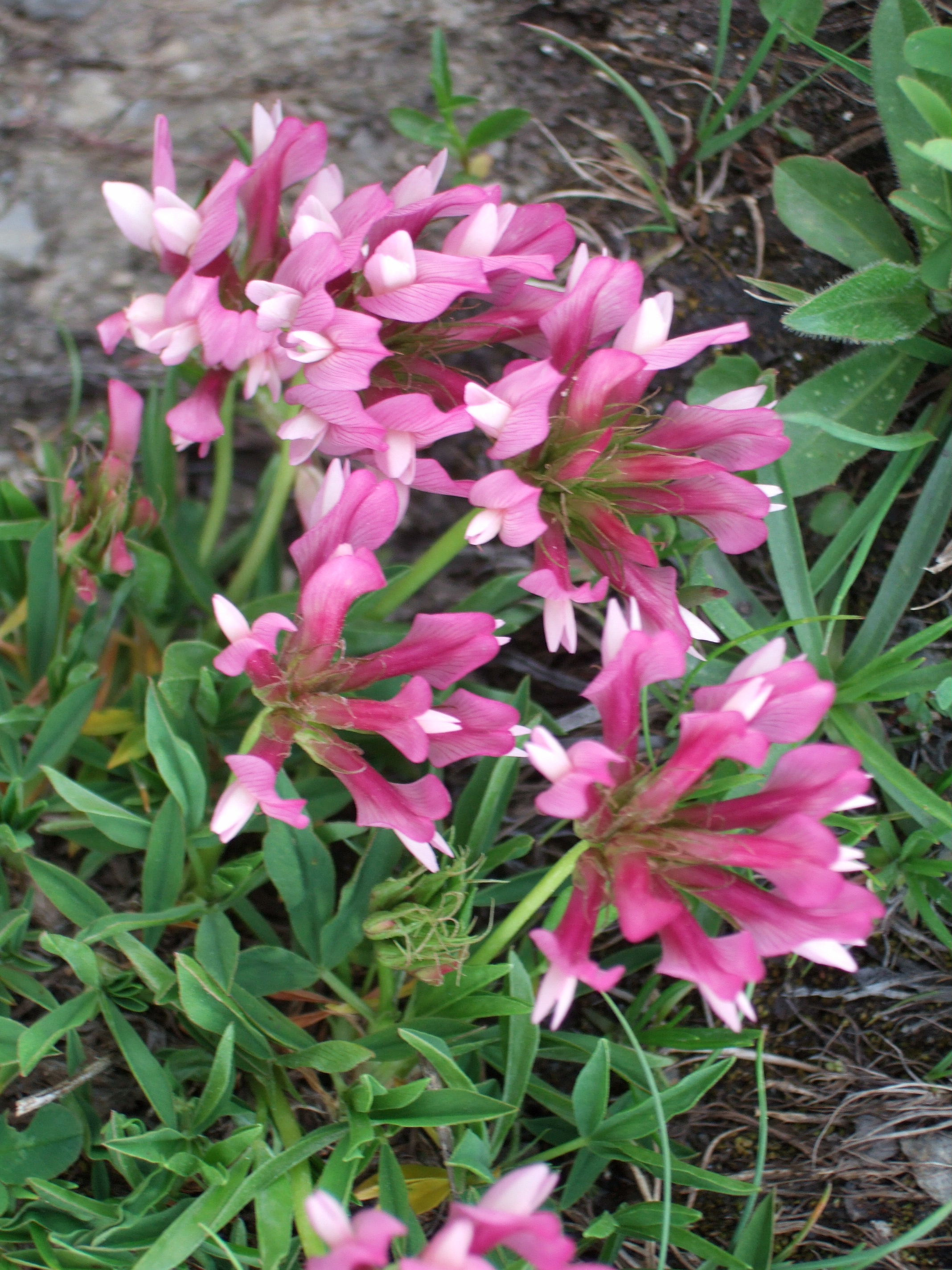 Trifolium alpinum at Kleine Scheidegg, Switzerland